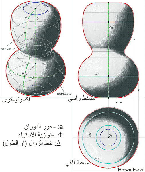 superficie di rotazione nel metodo di Monge e in assonometria هذا الرسمة تم إنشائها وتحميلها من قبل المهندس البروفسور حسن العيسوي